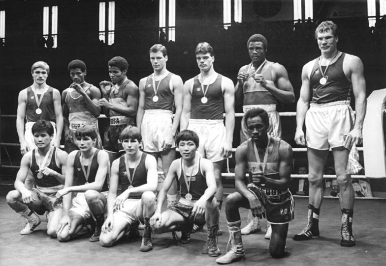 ADN-ZB Lehmann 9.3.86-we-Halle: 15. Chemiepokal-Turnier im Boxen-Finale-Die Sieger in den 12 Gewichtsklassen: Hintere Reihe: vlnr Siegfried Mehnert (DDR), Gandelario Duvergal (Kuba), Pedro-Orlando Reyes (Kuba), Henry Maske, Rene Suetovino (beide DDR), Felix Savon (Kuba), Ulli Kaden (DDR) knieend: Enchbat Nerguin (MVB), Andreas Zülow, Rene Breitbarth (beide DDR), Dsang Jong Tschoi (KDVS), Angel Espinosa (Kuba)